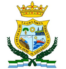 Escudo Oficial de Puerto Quijarro